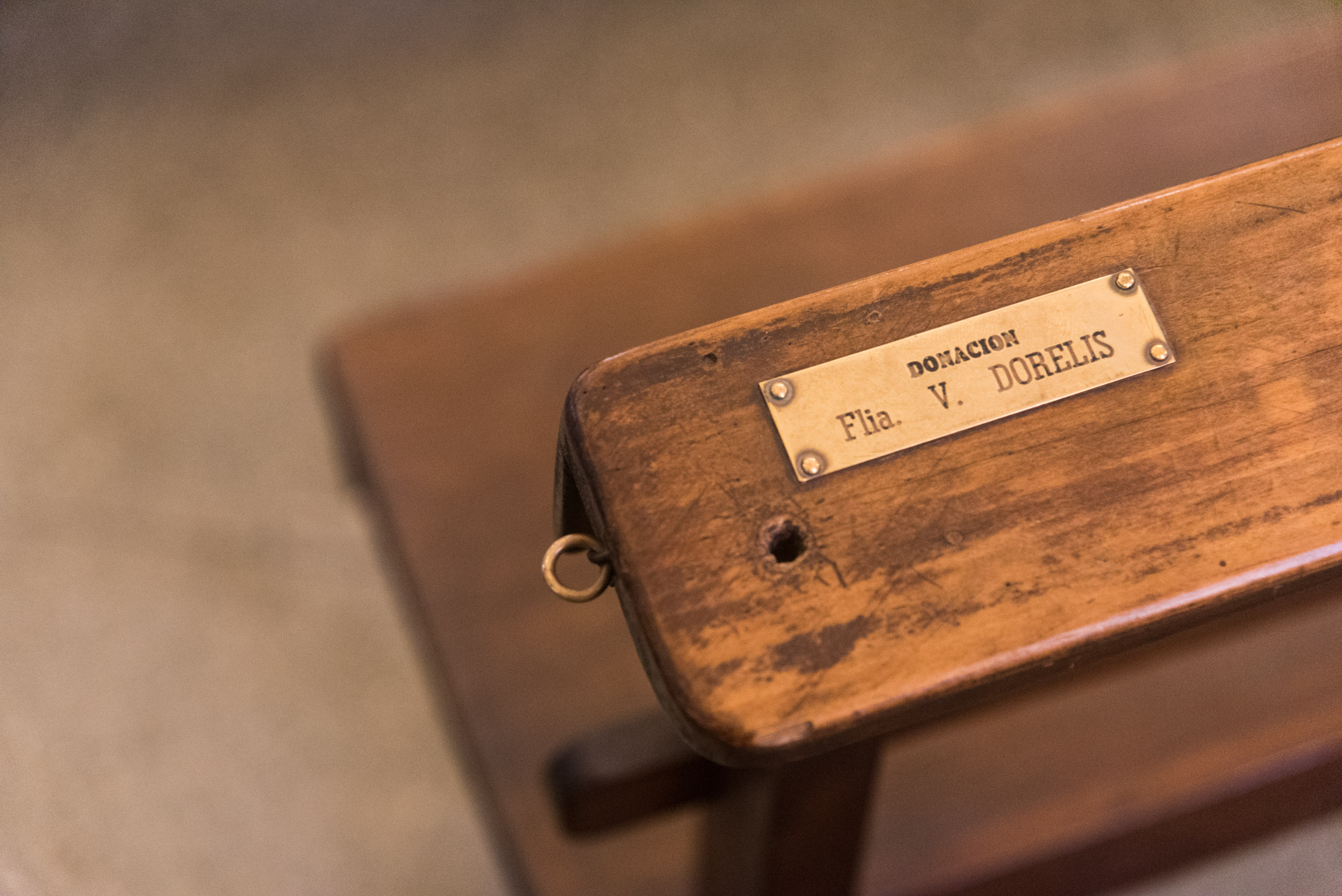 Užrašai ant bažnyčios suolų. Bertos Tilmantaitės nuotr.